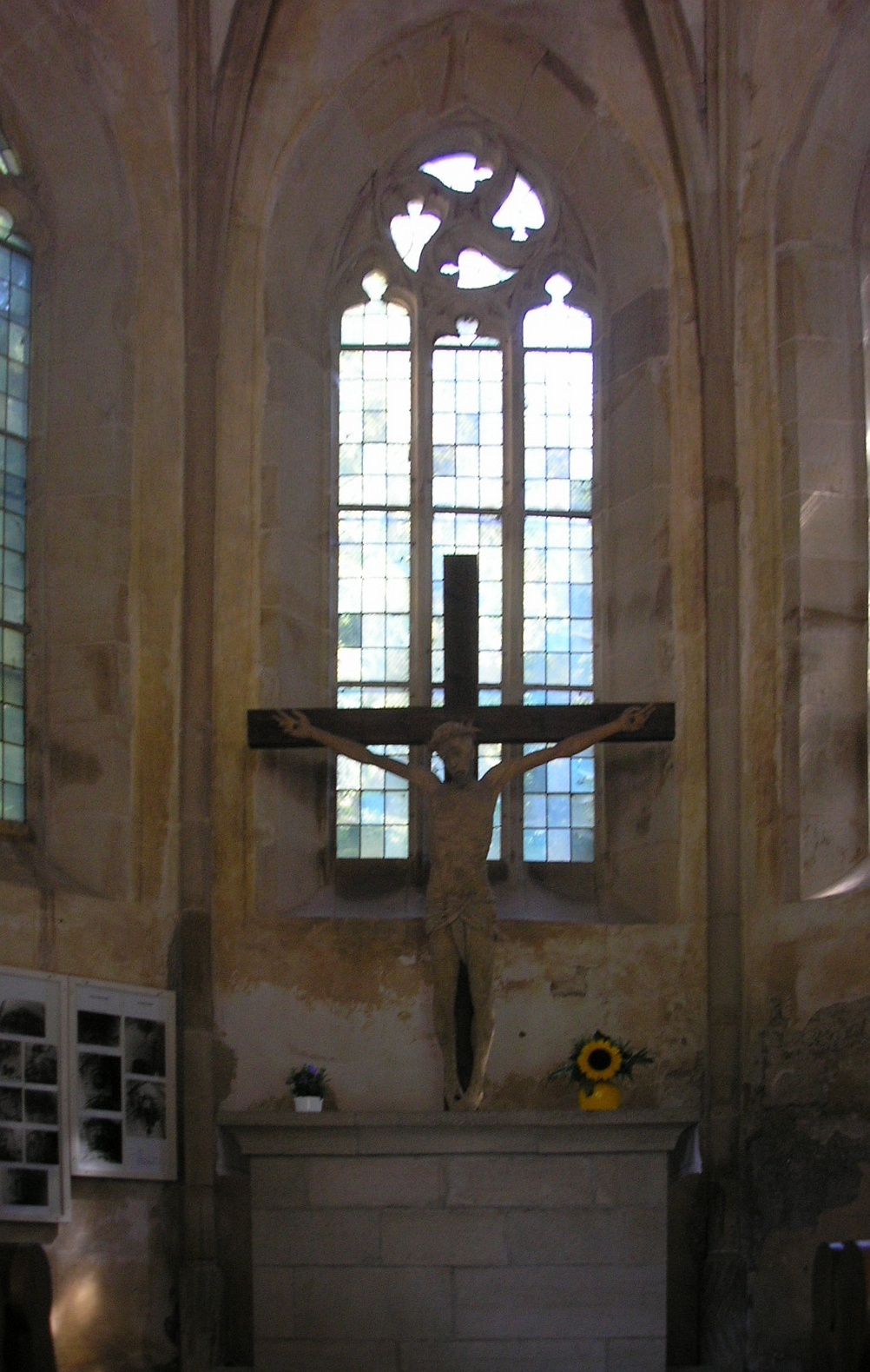 Der Altar der Liboriuskapelle in Creuzburg (Thüringen).